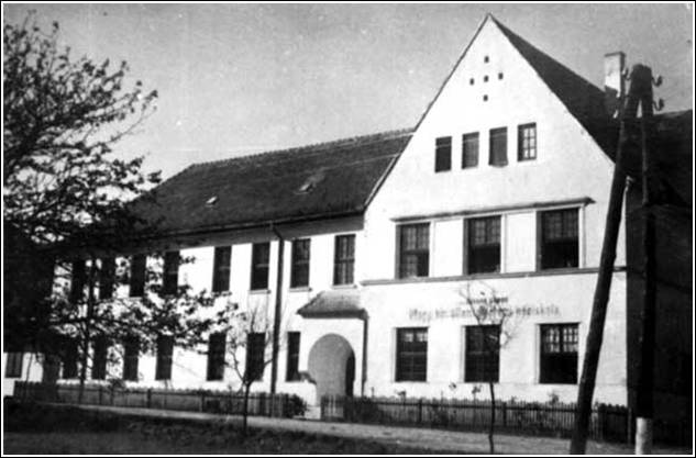 The Felsőszölnökian School in 1936